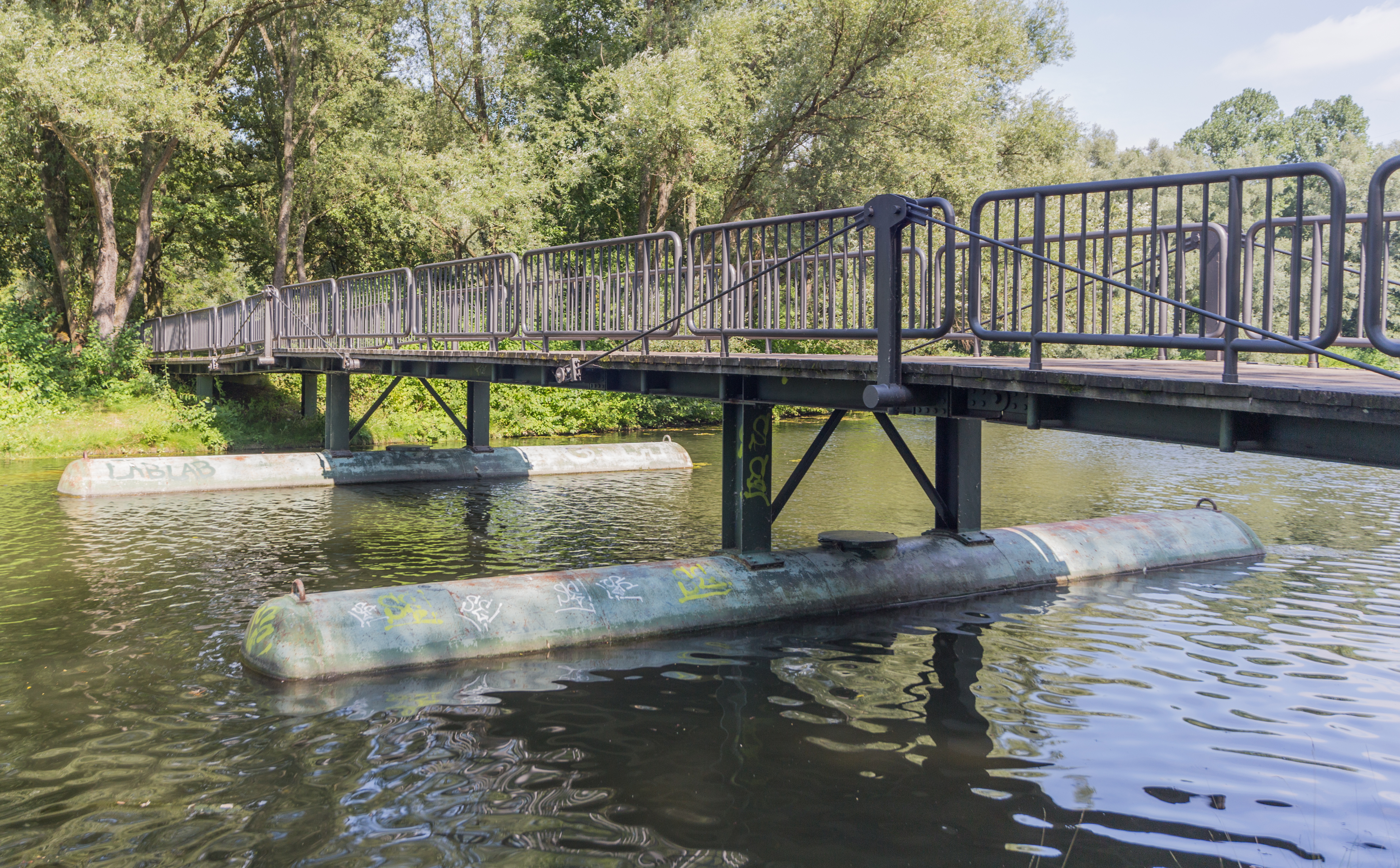 Ponton bridge, Rheinaue, Bonn, district Gronau